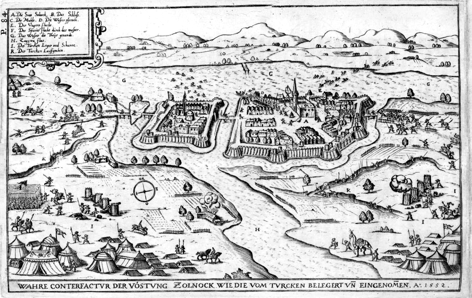 Szolnok ostromának ábrázolása 1552-ben Ortelius: Redivivus Et Continuatus, Oder Der Ungarischen Kriegs-Empörungen Historische Beschreibung (1665) című művében